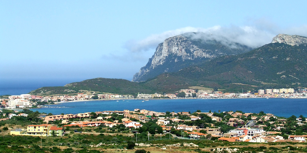 Golfo Aranci, lato ovest